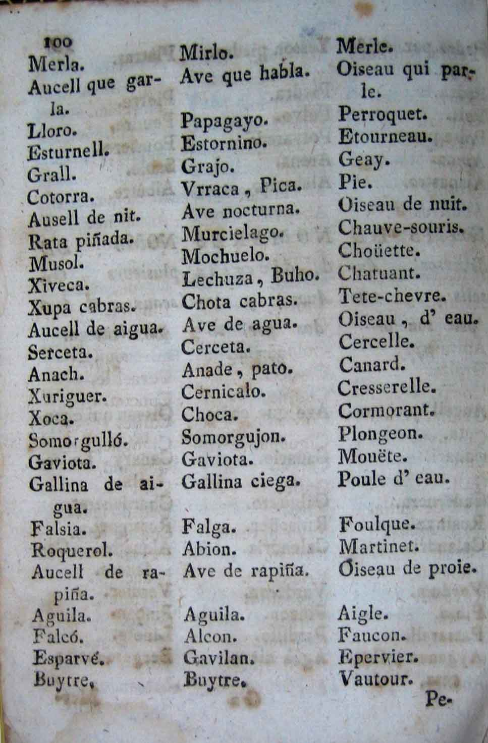 Una pàgina del "Promtuario trilingüe" (català-castellà-francès) de 1771, de Josep Broch